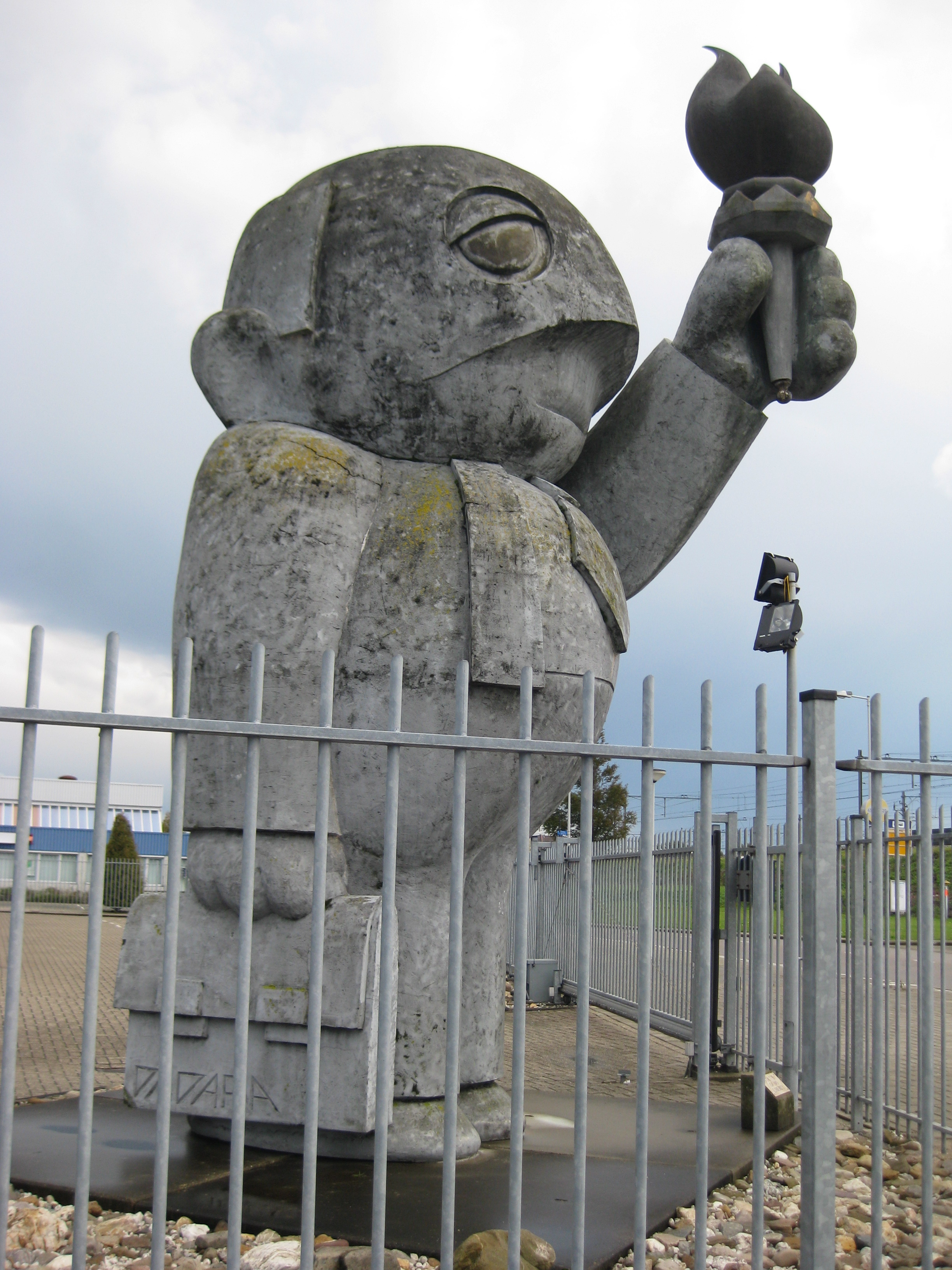 Sculptuur Statue of No Liberty 1999 onderdeel van het Greyman project. Kunstenaar Dadara (Daniël Rozenberg). Museumplein, Amsterdam. Momenteel in opslag aan de Rhôneweg in Amsterdam-Westpoort.